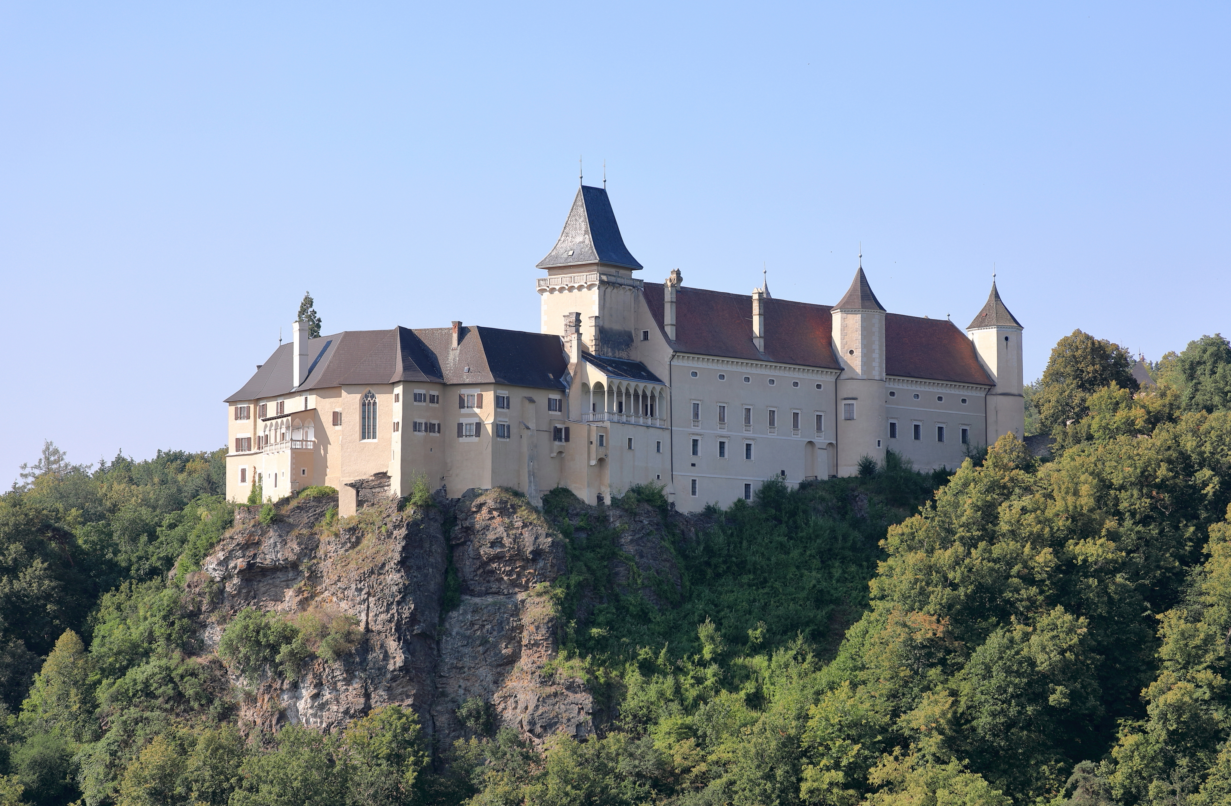 Nordnordostansicht des Schlosses Rosenburg in Rosenburg, ein Ortsteil der niederösterreichischen Gemeinde Rosenburg-Mold.Ursprünglich eine mächtige mittelalterliche Burg in Berglage über dem Kampufer. Ende des 16. Jahrhunderts erfolgte ein Umbau zu einem Renaissanceschloss und in der 2. Hälfte des 17. Jahrhunderts ein weiterer Ausbau. Nach einem Brand 1800 verfiel das Schloss. Zwischen 1859 und 1875 ließ Ernst Karl von Hoyos-Sprinzenstein die vom Verfall bedrohte Rosenburg nach den Darstellungen des Schlosses in der Topographia Windhagiana von 1673 orientierend, umfassend restaurieren und machte sie als eine der ersten Burgen in Österreich öffentlich zugänglich.